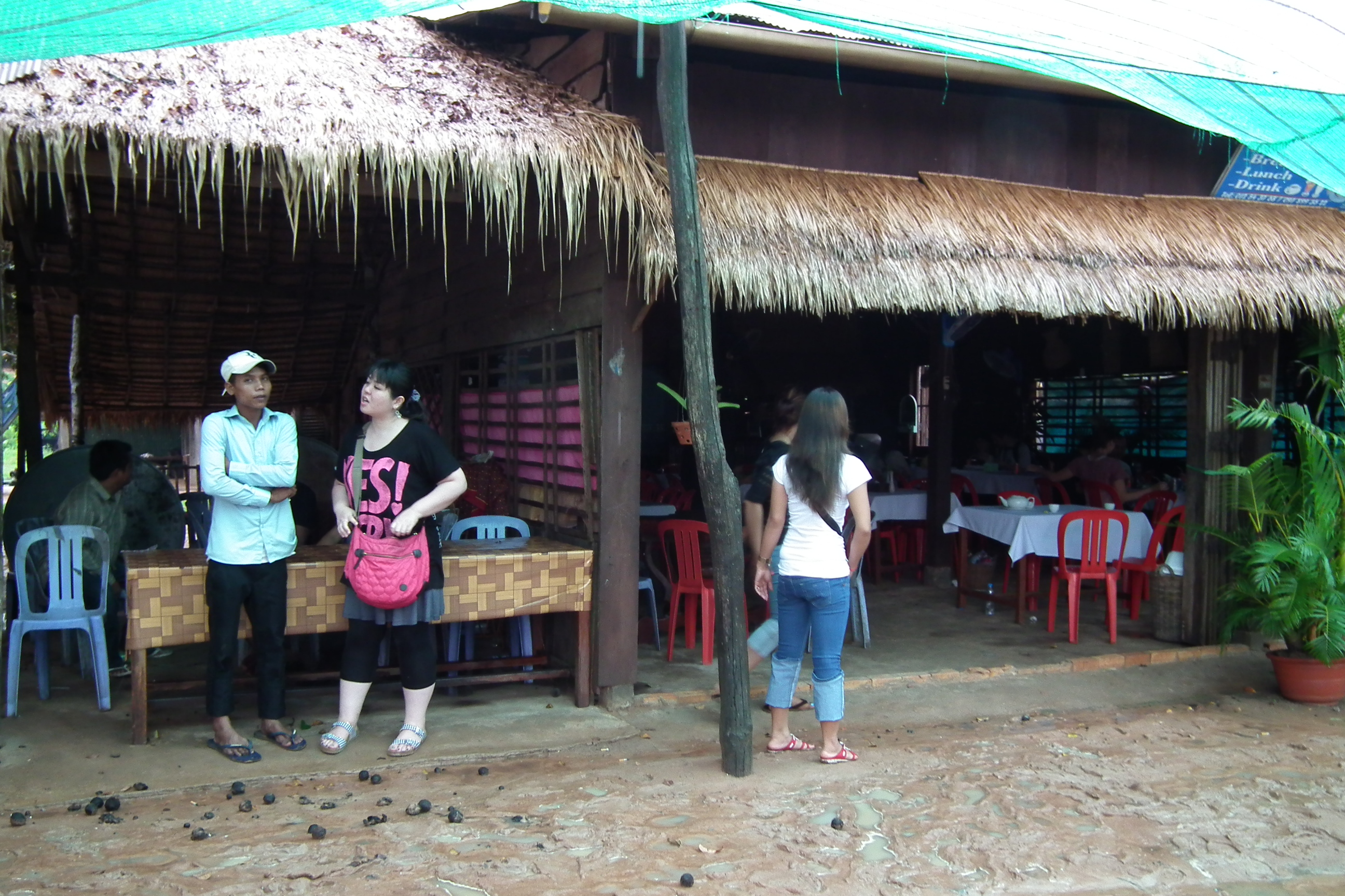 Beng Mealea-Restaurant ប្រាសាទបឹងមាលា ベンメリア前レストラン